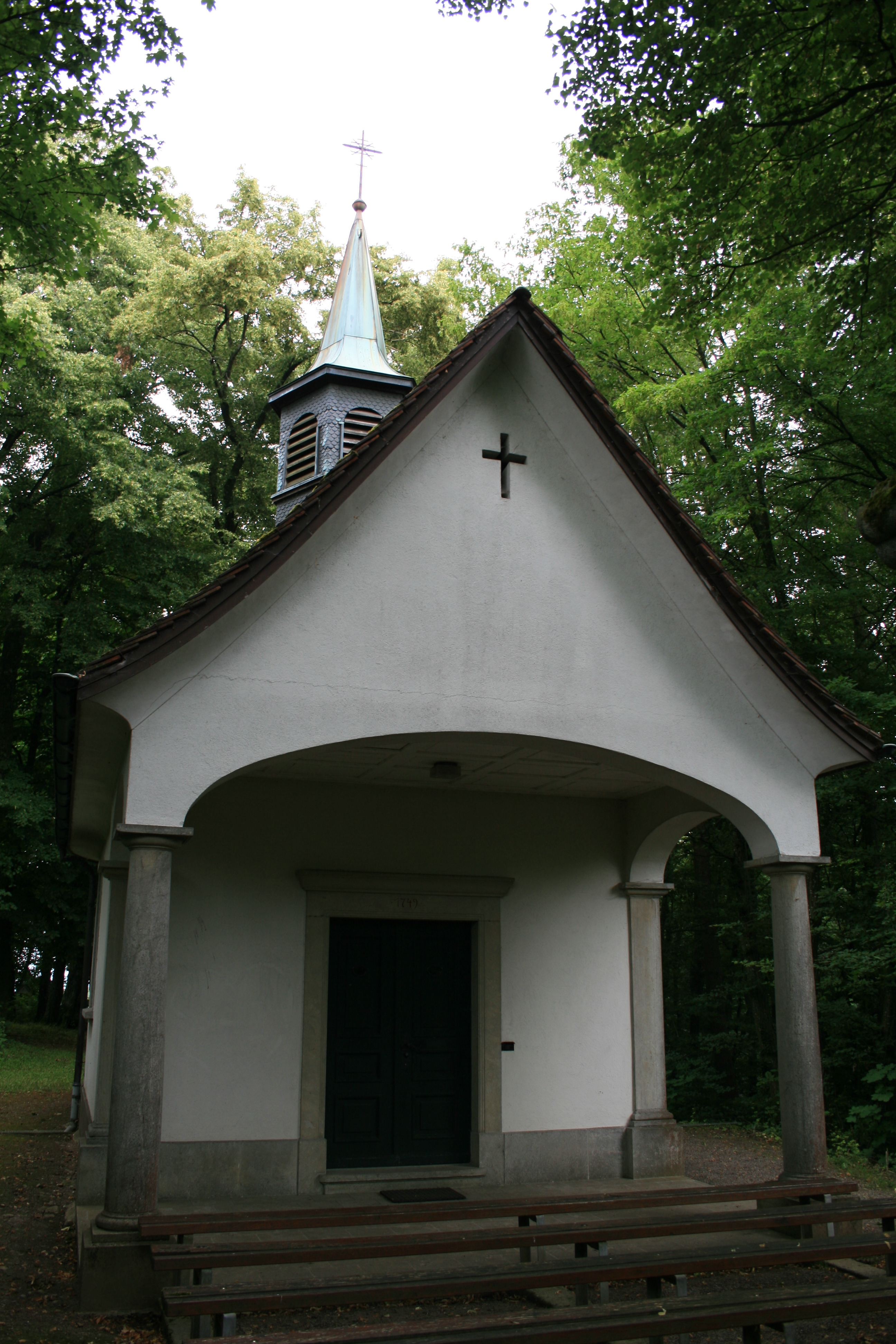 Mariekapelle uf em Sulperg, Wettige, Schwiiz